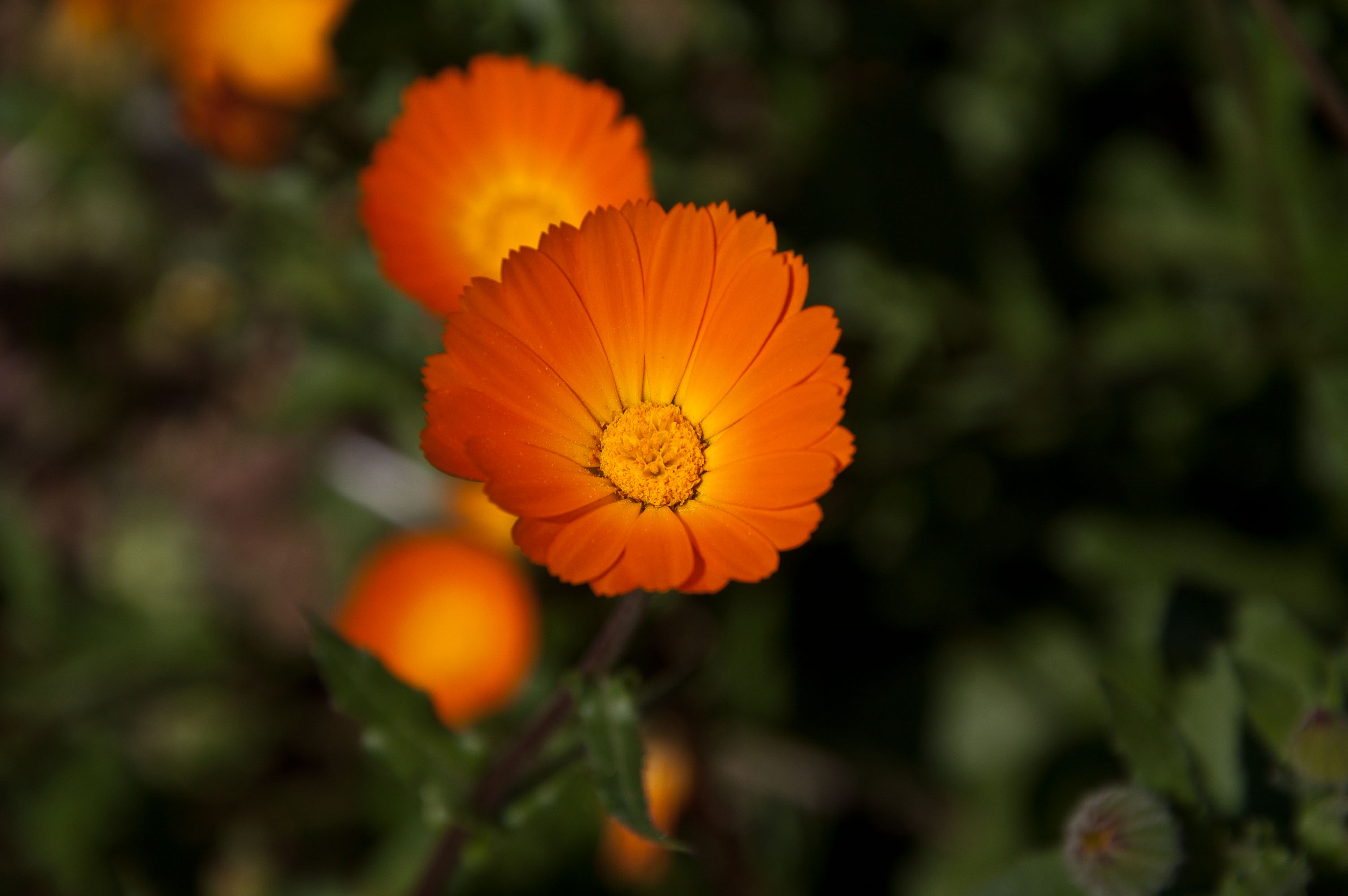 Calendula suffruticosa subsp. fulgida (Raf.) Ohle flower